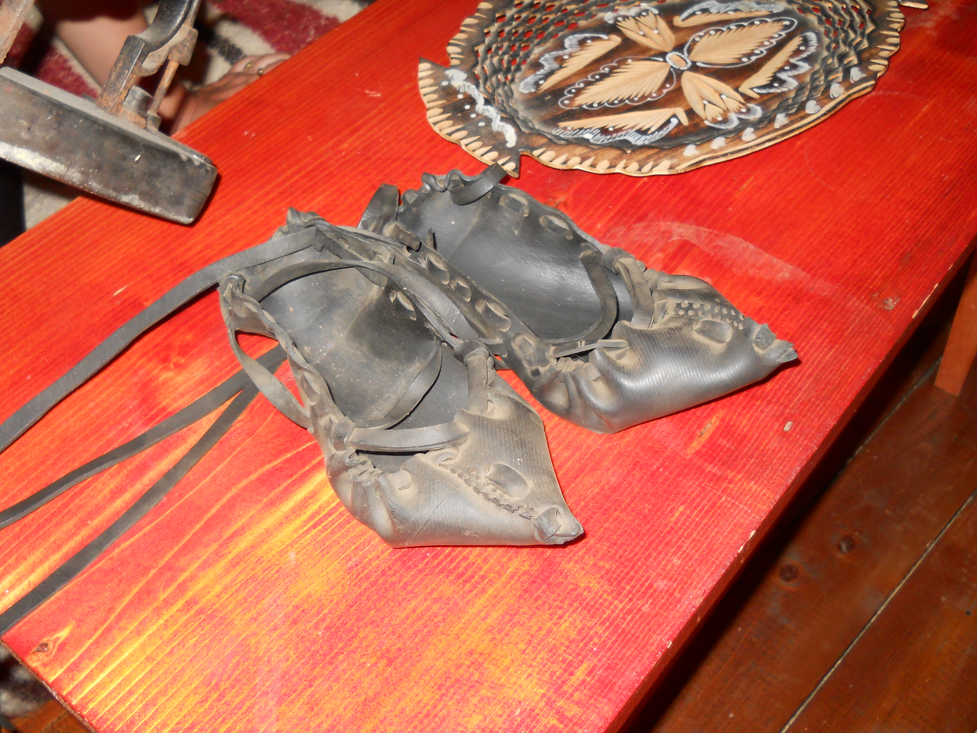 opinci